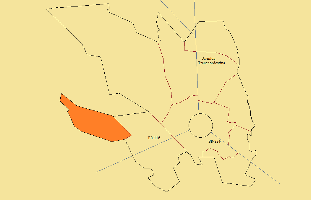 Distrito Bonfim da Feira em cor laranja, em Feira de Santana, Bahia, Brasil.